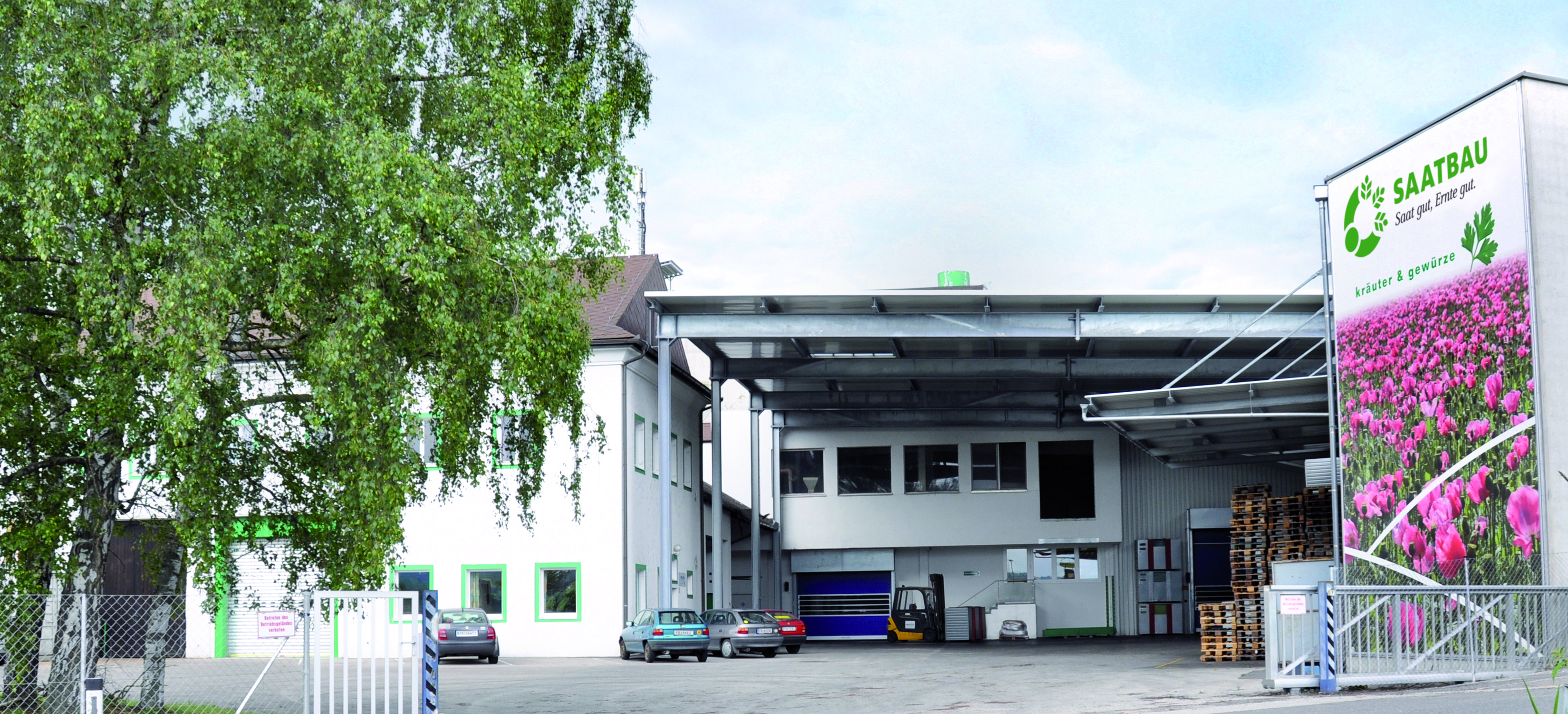 Das Kräuter & Gewürze - Center in Kefermarkt ist eine der modernsten Anlagen seiner Art in Europa.